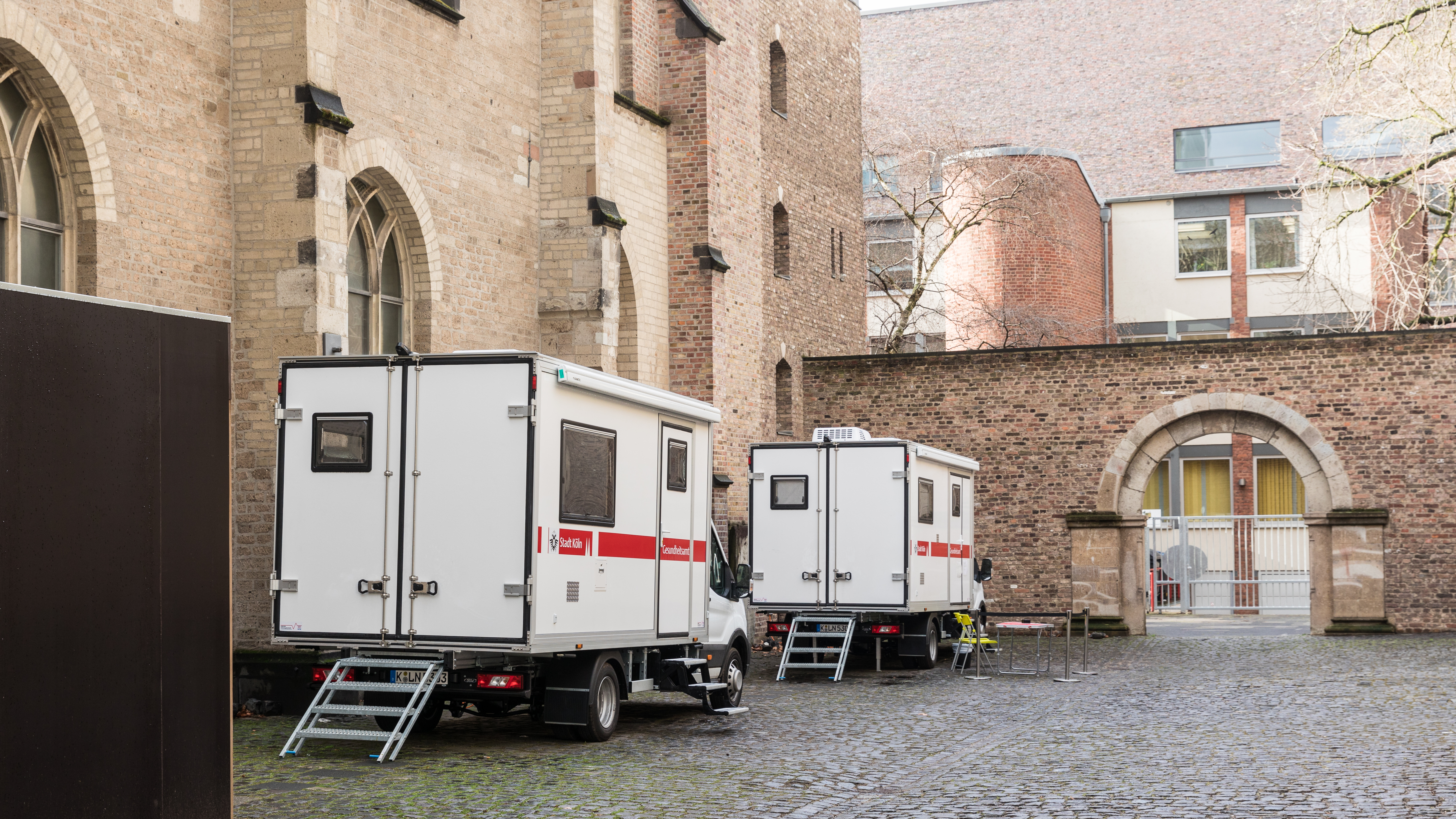 Fahrzeuge für das mobile Drogenhilfeangebot Stadt Köln, Jabachstraße. Im Bereich zwischen St. Peter (links) und St. Cäcilien - Cäcilienhof